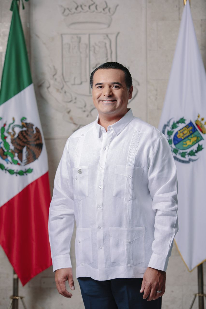 Fotografía oficial en toma de posesión como presidente municipal de Mérida 2018-2021.